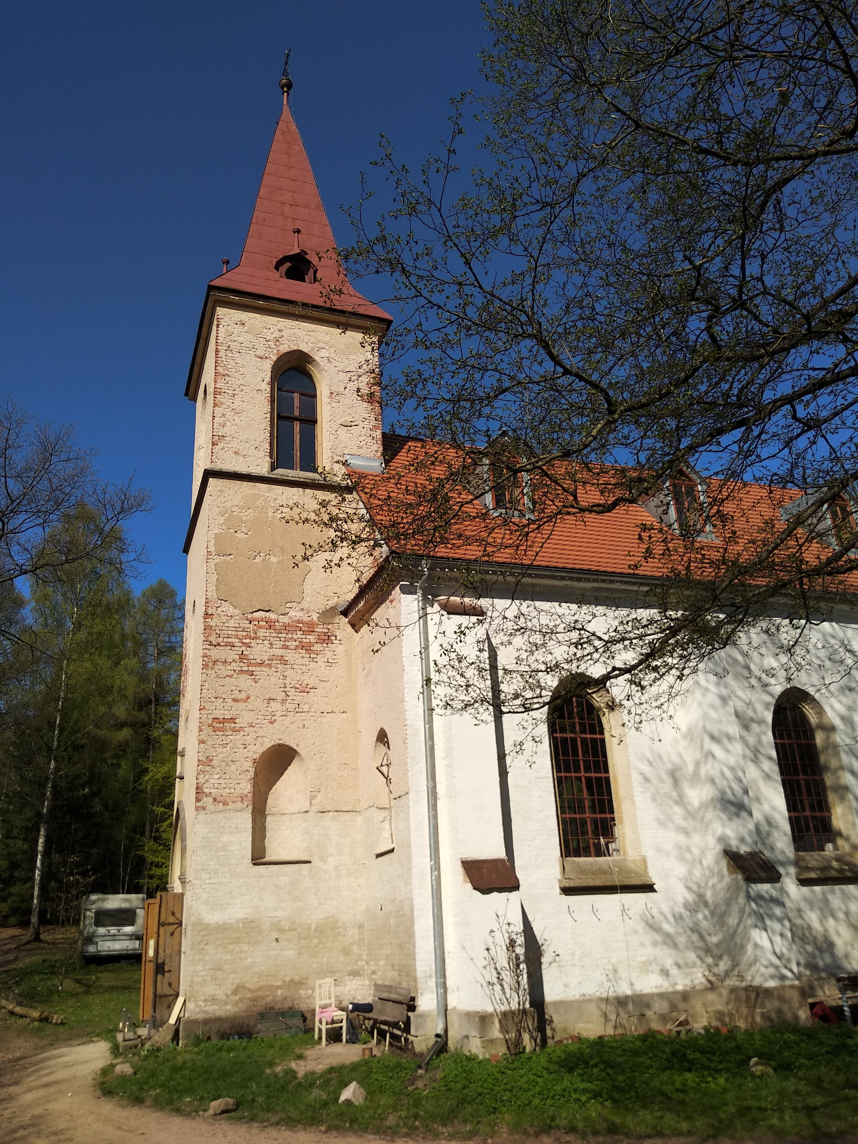 Kaple Panny Marieve Vernéřovicích